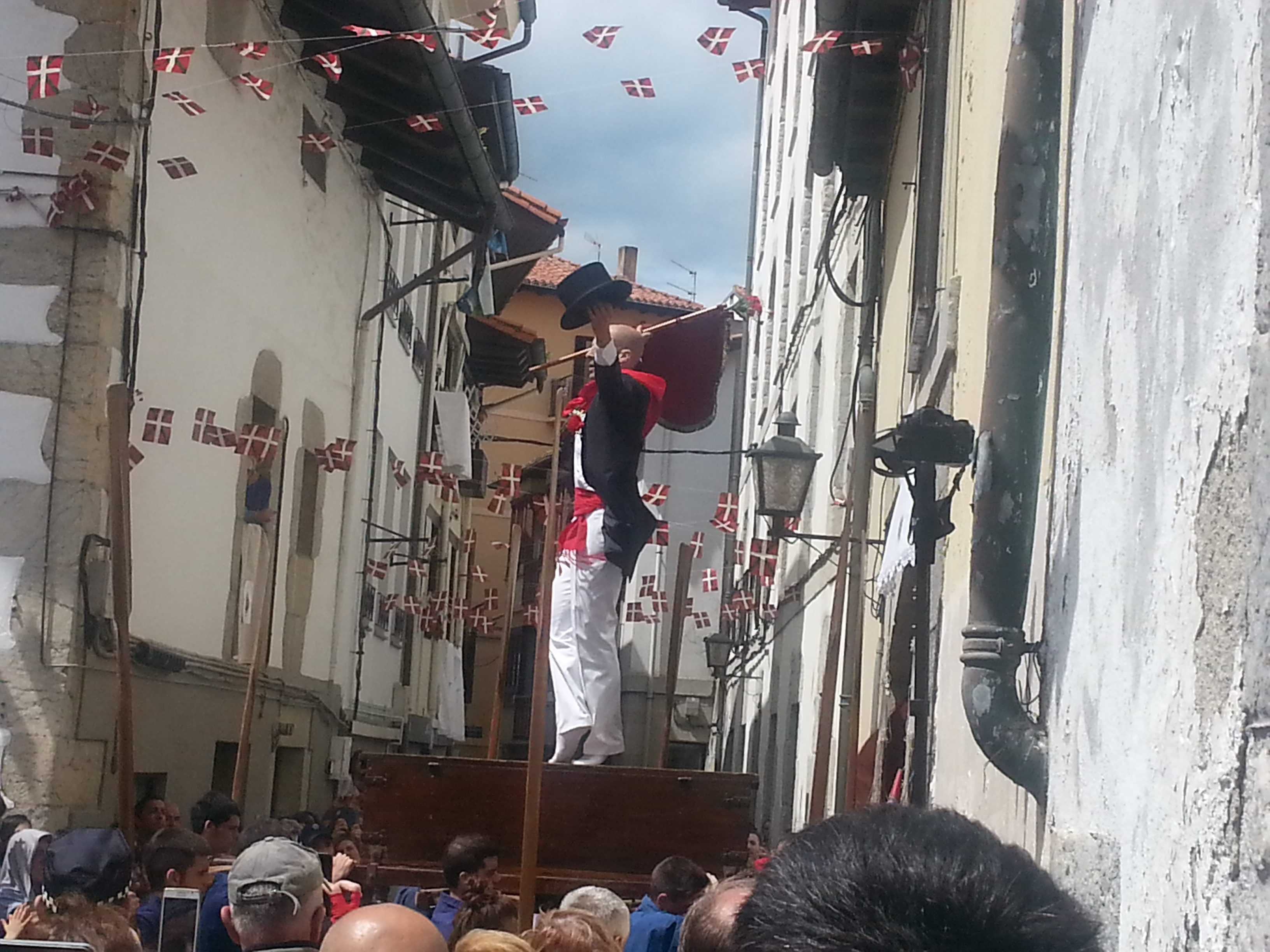 Kaxarranka 2017. Dantzaria: Asier Uskola. Lekeitio.